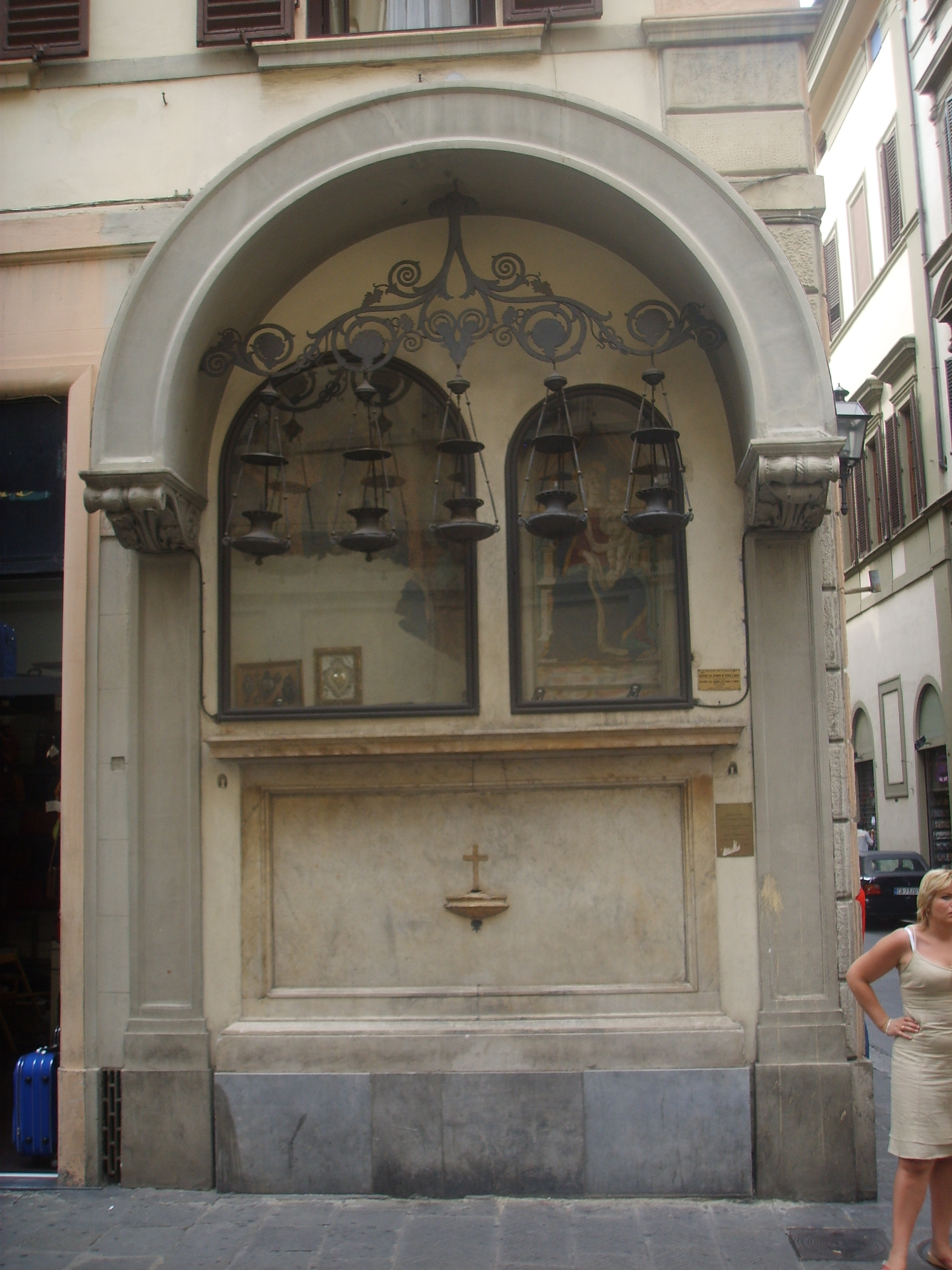 Tabernacolo_delle_Cinque_Lanterne in Florence, Italy